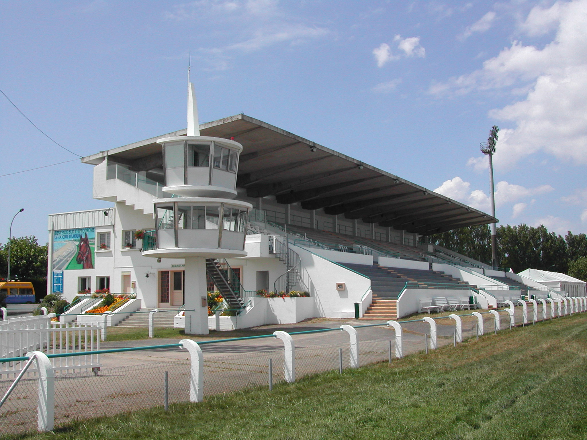 Tribunes de l'hippodrome de Pornichet avant 2010